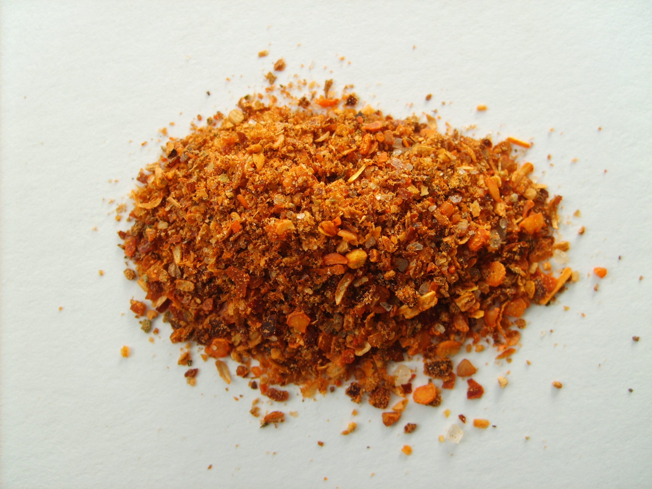 Merkén, aliño chileno que procede principalmente de la cocina Mapuche.